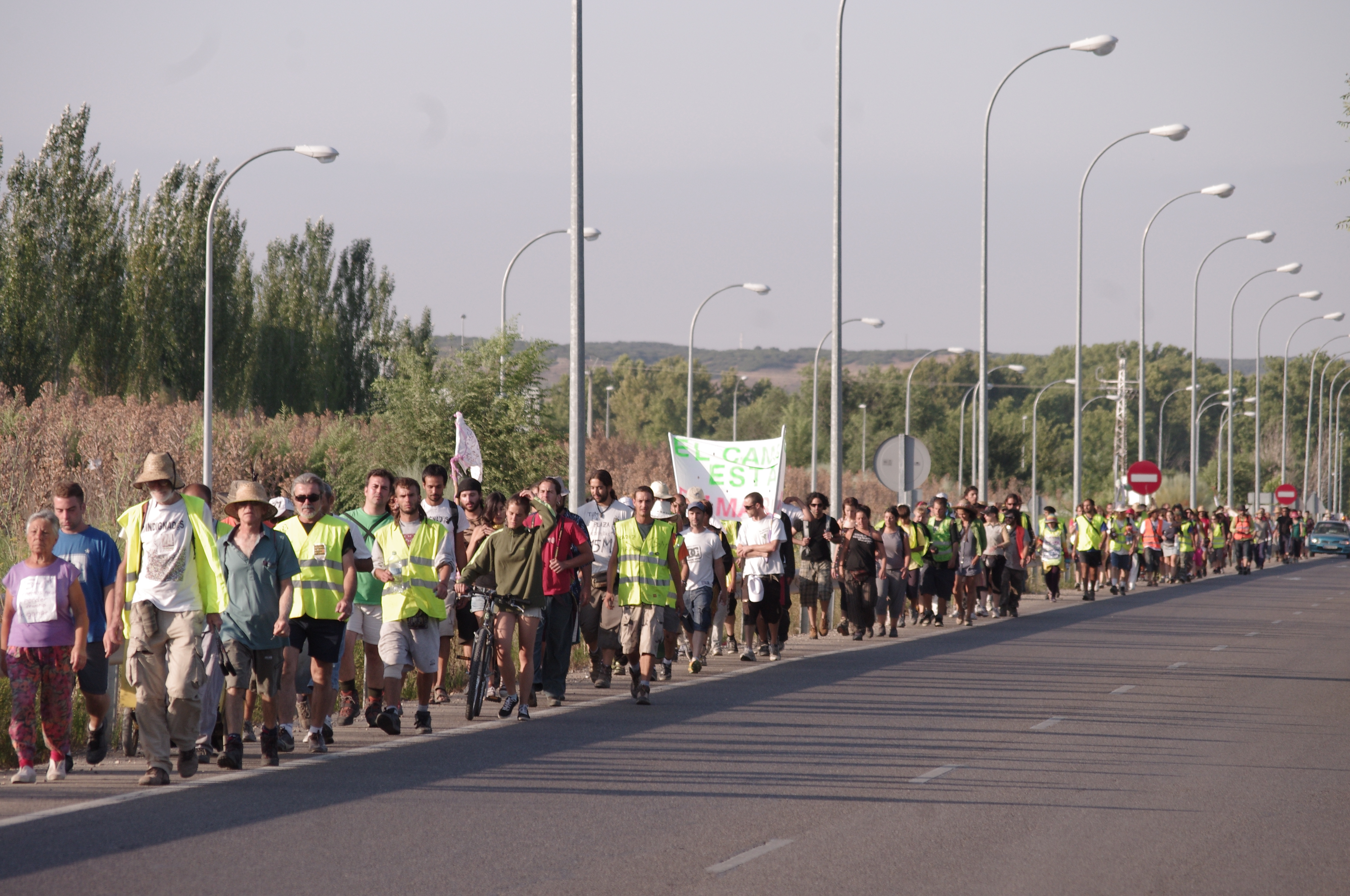 Columna Sur. Tarde noche en Aranjuez.